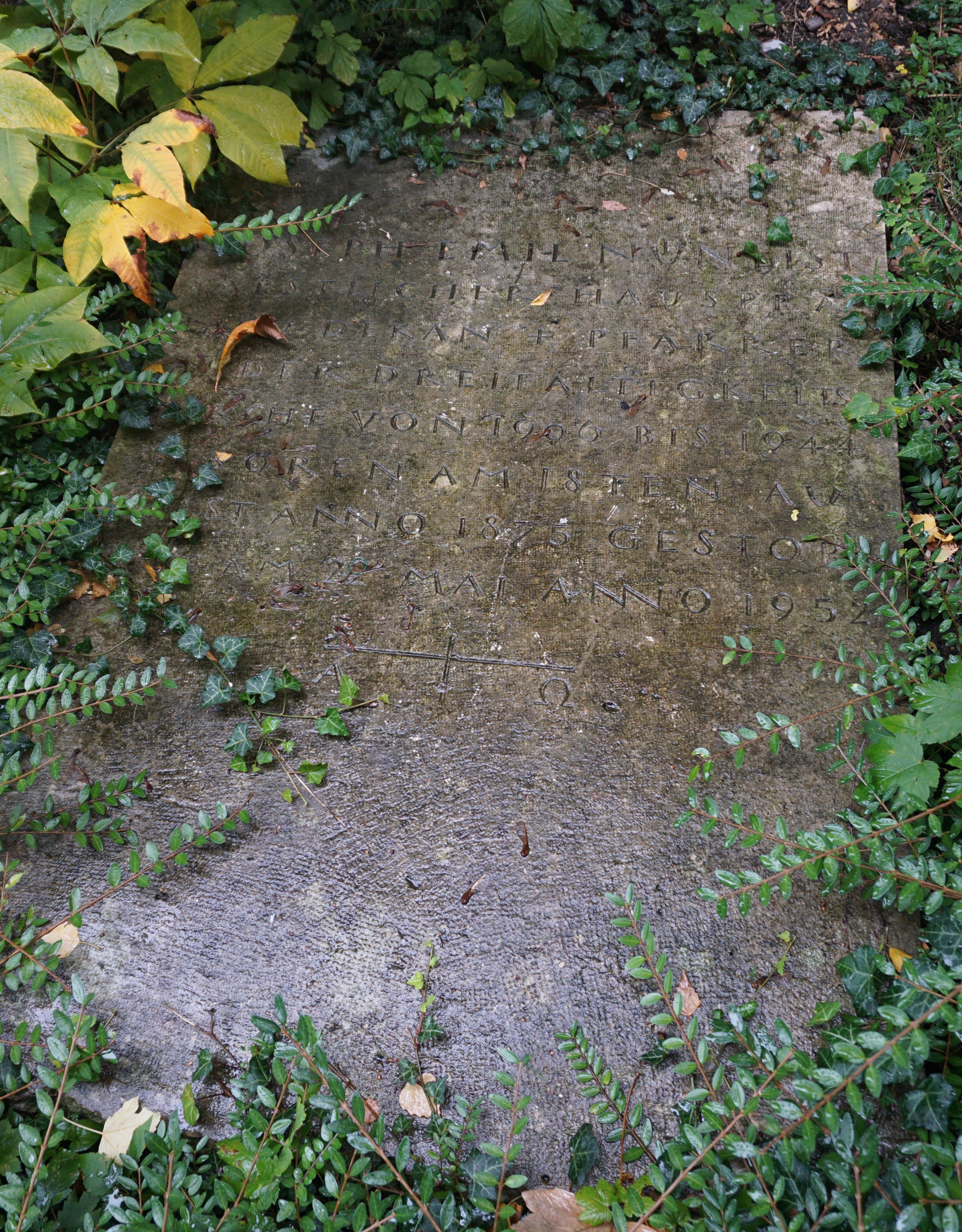 Gedenkplatte für Pfarrer J. Emil Nünlist bei der Dreifalitgkeitskirche Bern